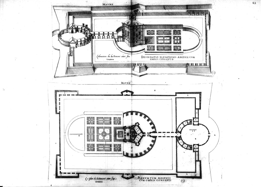 Château de Maulnes, Cruzy-le-Châtel, Yonne - plan d'Androuet du Cerceau